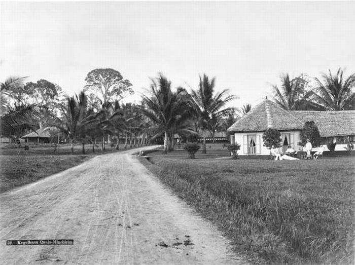 Foto. Kegelbaan op de onderneming Kwala Mintjirim.